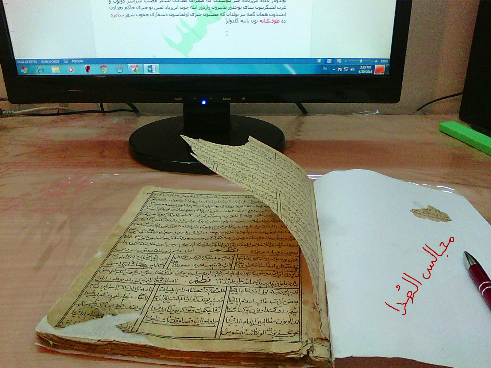 مصیبت کربلا از کتاب مجالس الهُدای. ادبیات گذشته بهار